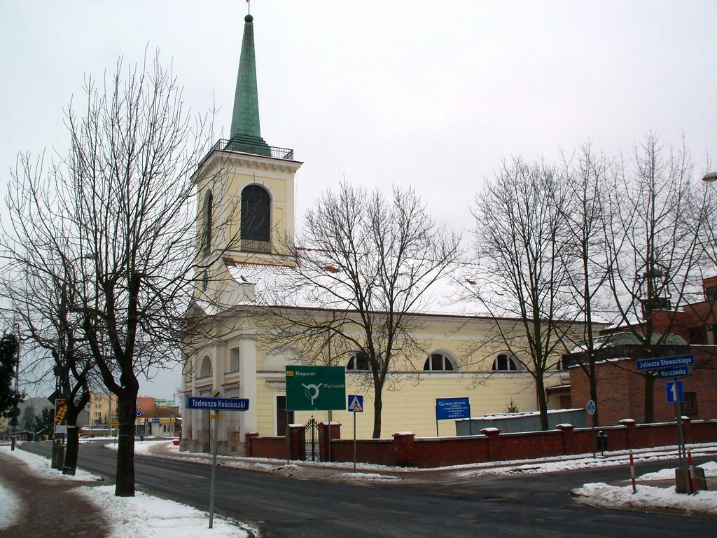 Kościół pod wezwaniem św. Michała Archanioła w Nowym Dworze Mazowieckim